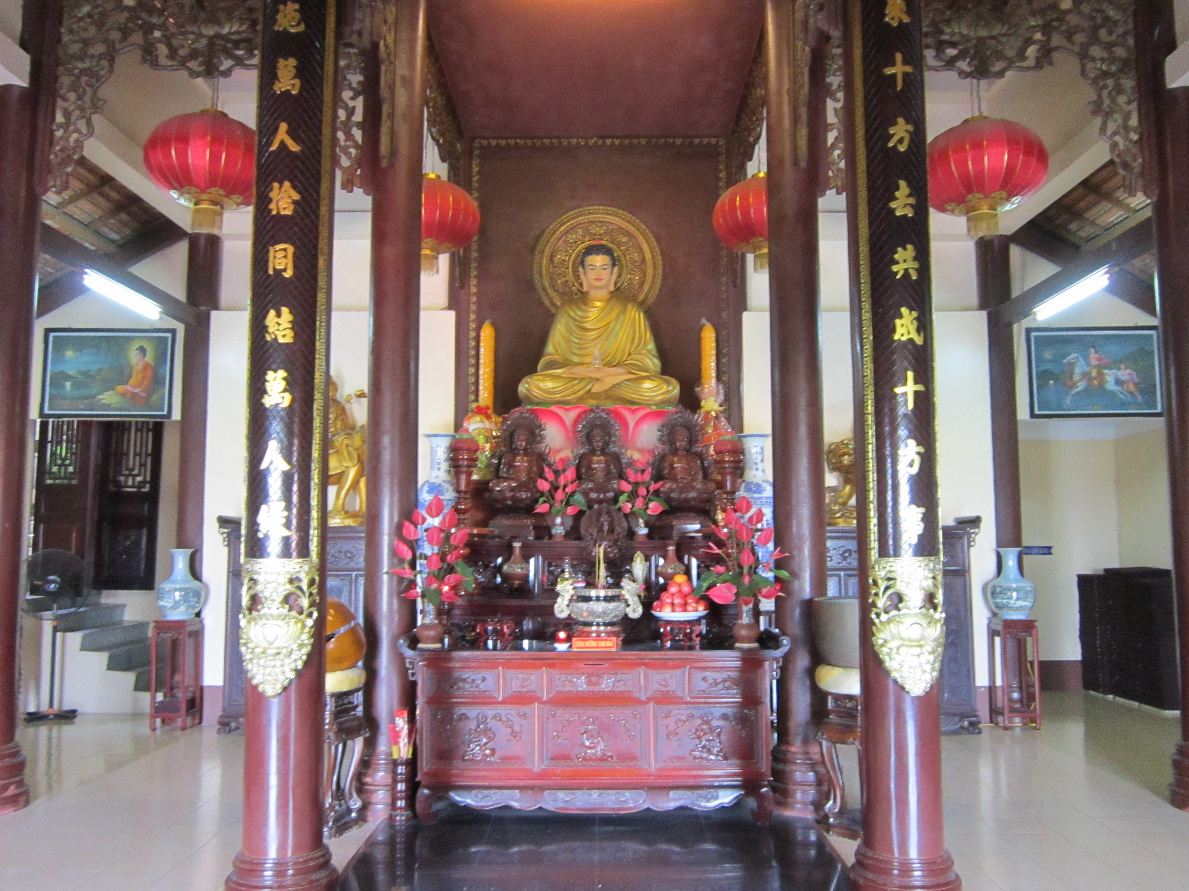 Tượng Phật Thích Ca trong chính điện chùa Phước Điền ở núi Sam (Châu Đốc, An Giang, Việt Nam).